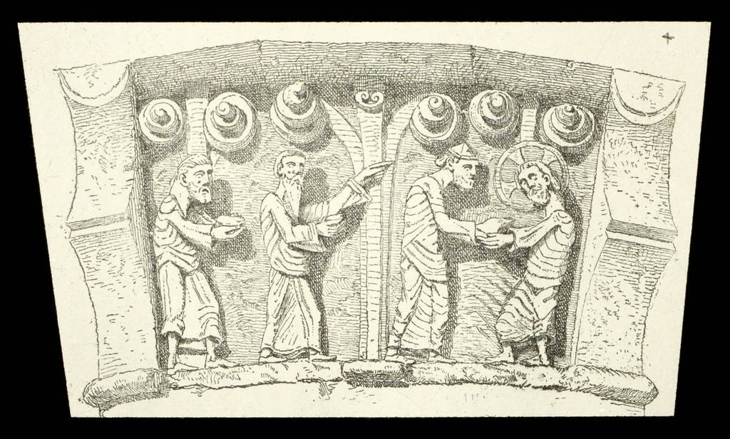 Cessac église St Romain arc triomphal (Drouyn 1870)